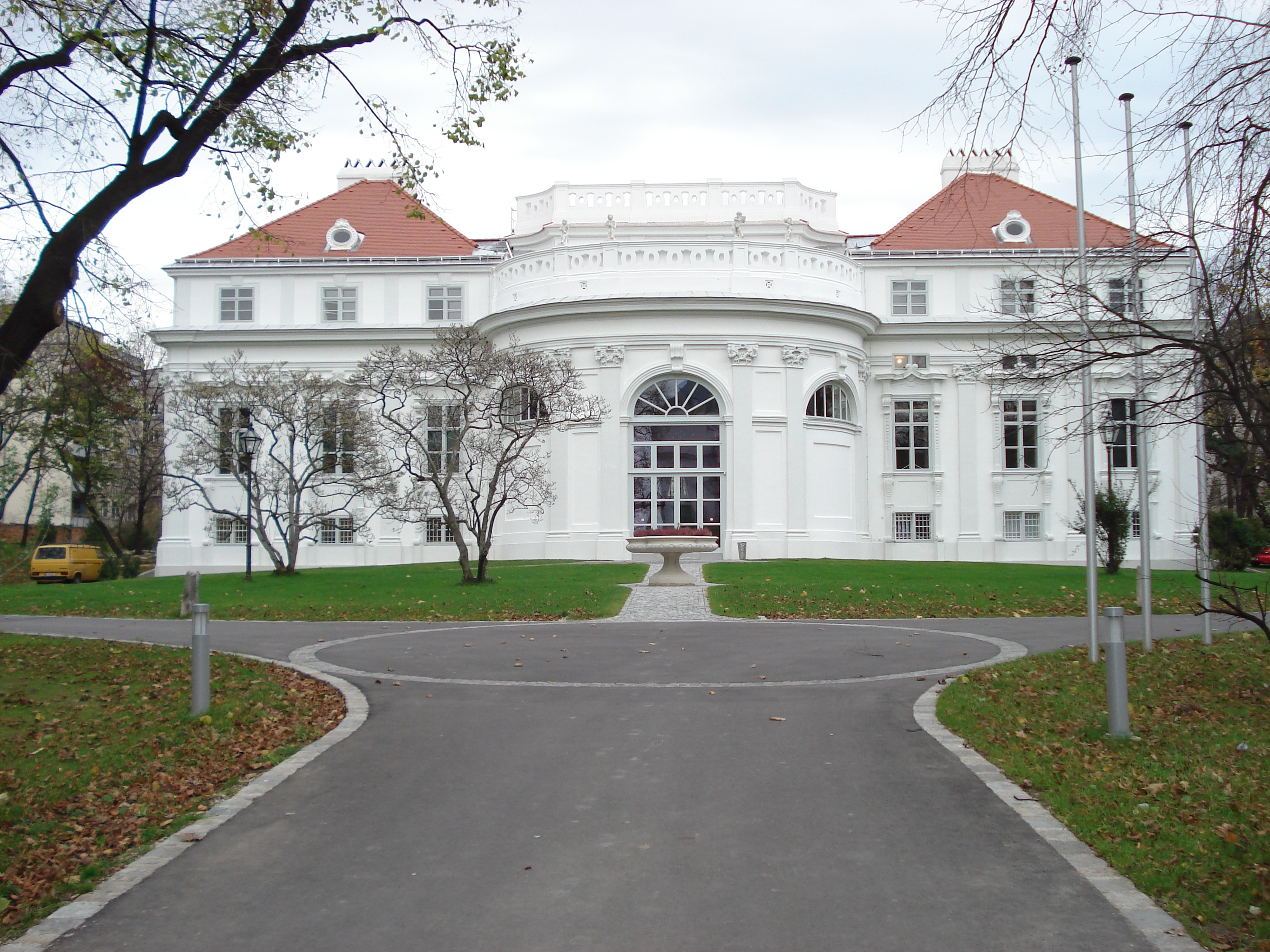 Schönburg-Palais1